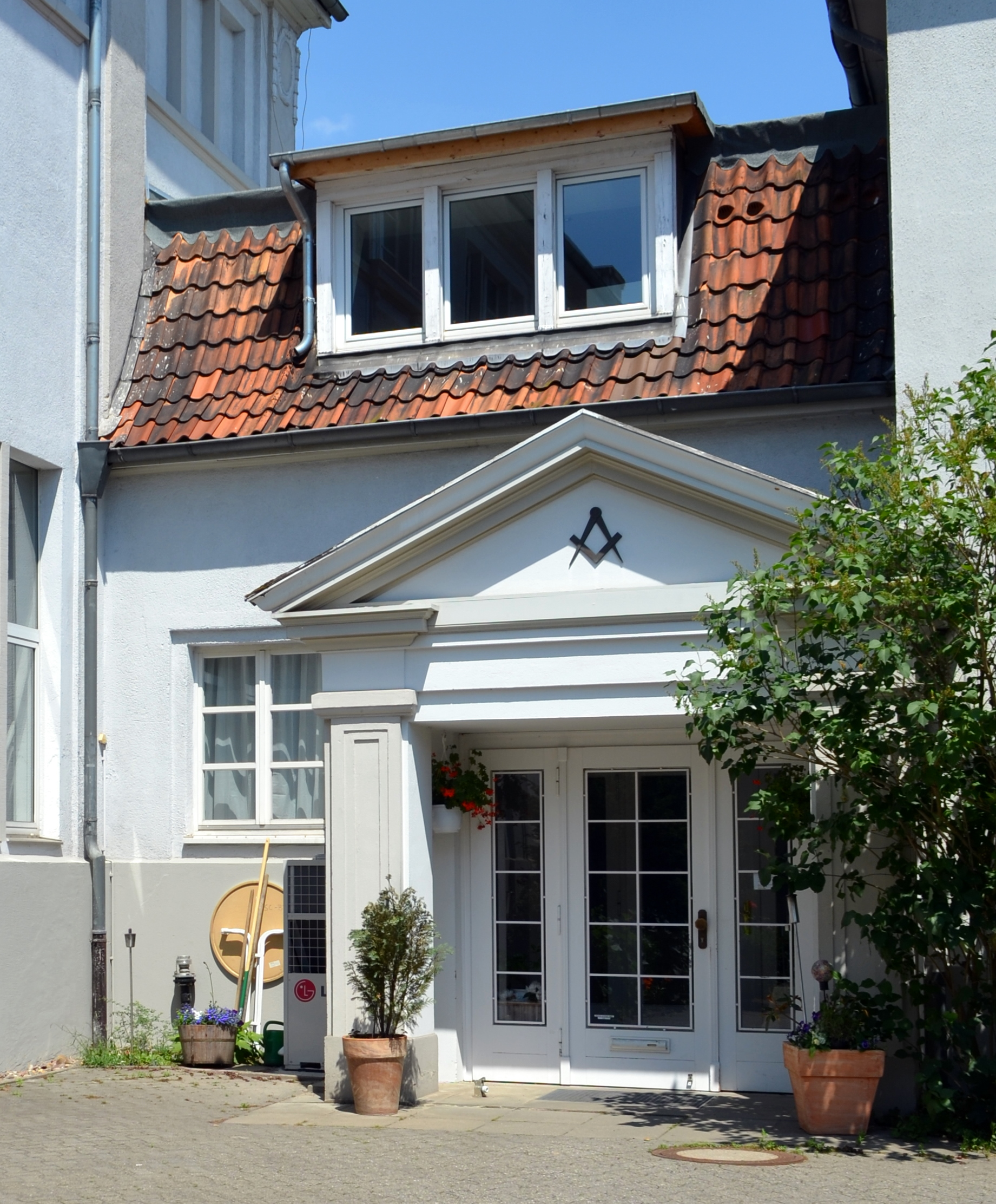 Braunschweig, Löwenwall 9: Eingang zum „Haus der Logen“, in dem unter anderem die Freimaurerloge Carl zur gekrönten Säule ansässig ist.